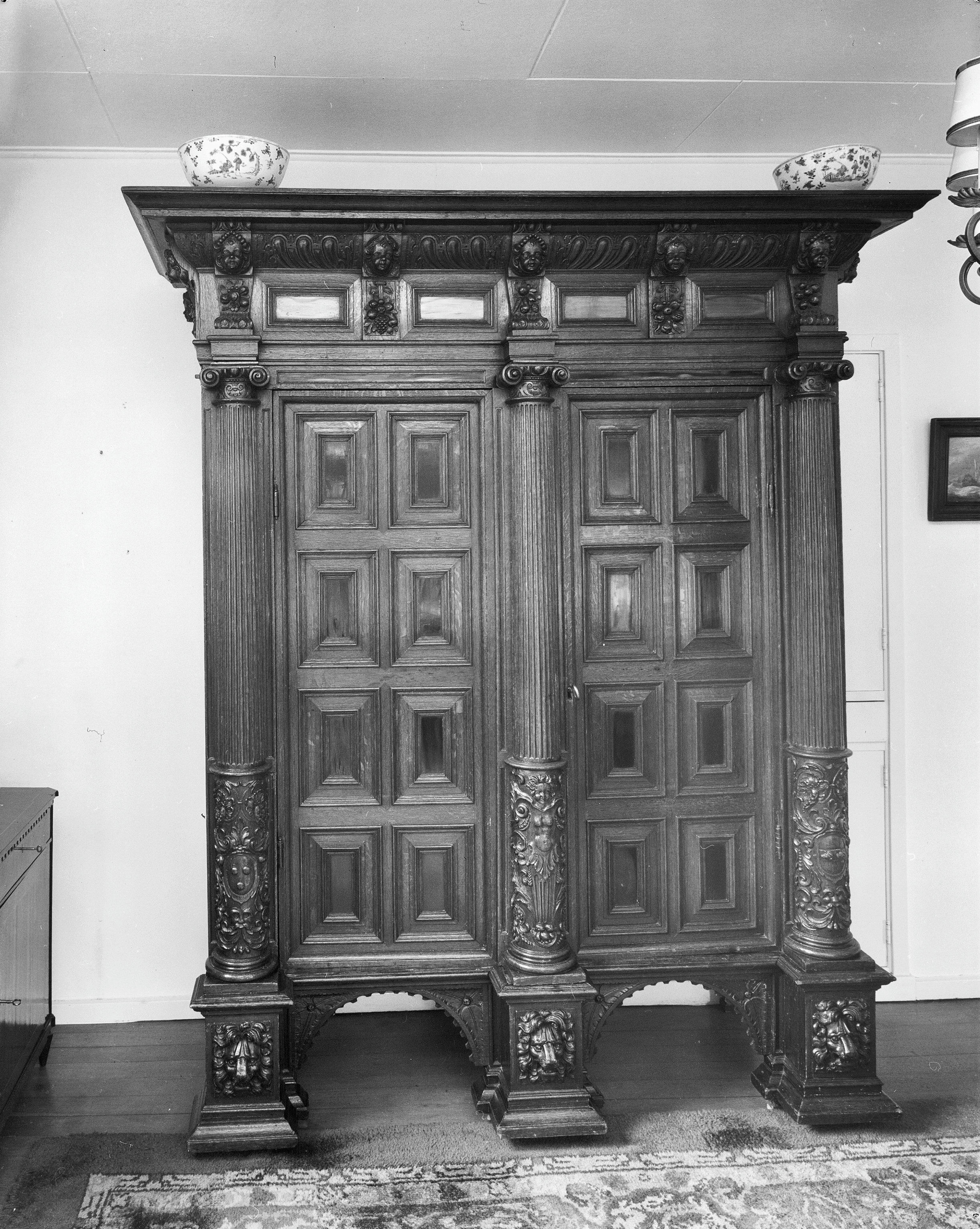 Huis "De Hemelhof": kast